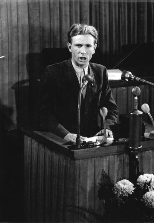 Illus/Quaschinsky 10.10.51 Ausserordentliche Volkskammersitzung Auf einer Außerordentlichen Volkskammersitzung am 10.10.51 antwortete Ministerpräsident Grotewohl auf die Vorschläge des Bundestages. UBz: Bruno Kiesler spricht für die FDJ.